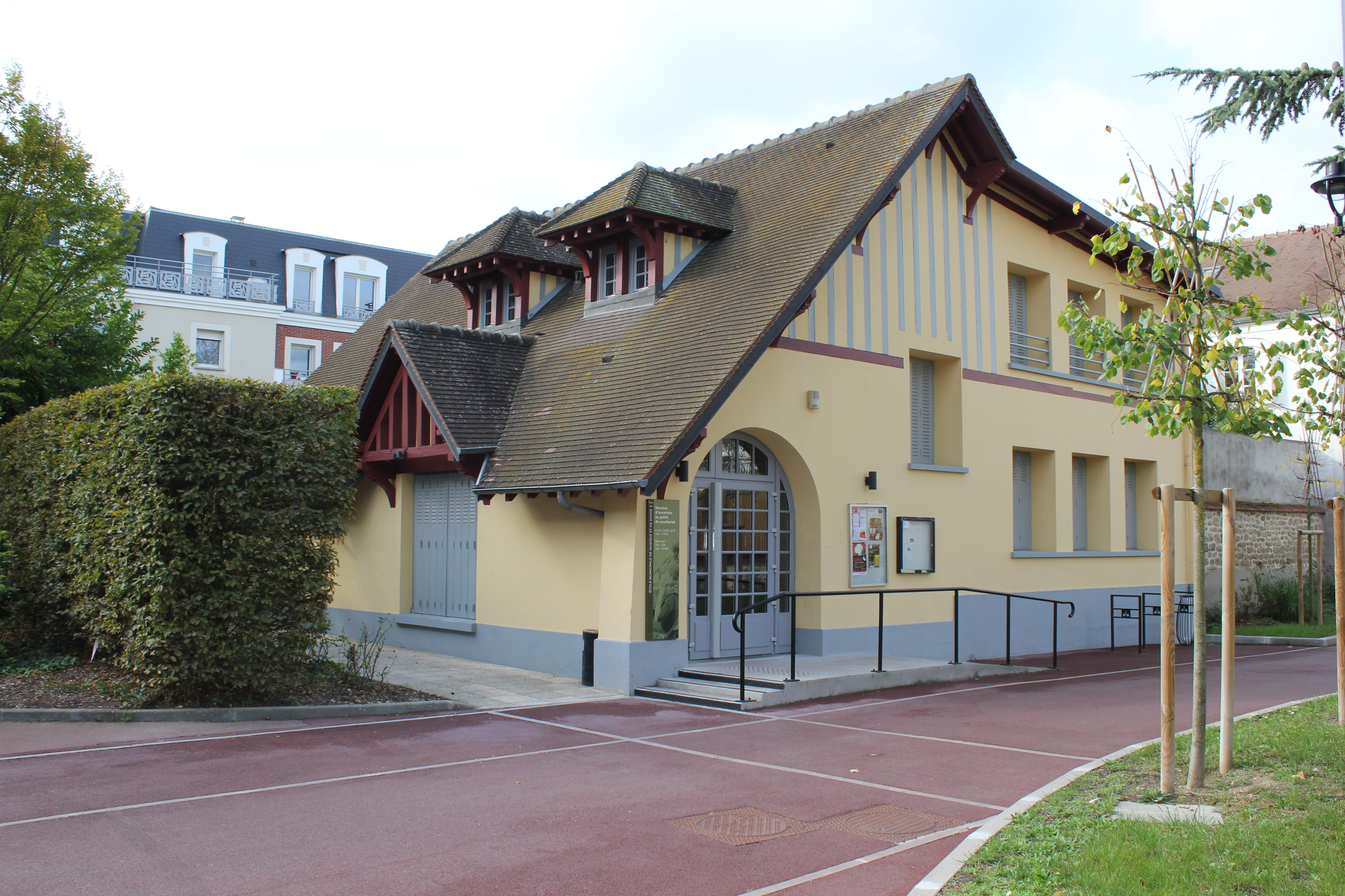 Ecole de musique et de danse de la ville de Verneuil-sur-Seine.